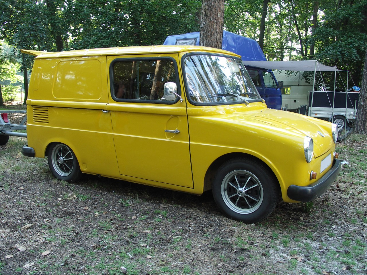 Volkswagen Fridolin